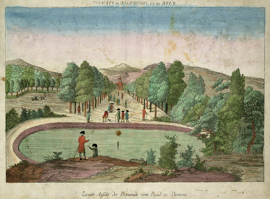 Bad Pyrmont, Zweyte Ansicht der Promenade vom Baad zu Pyrmont, um 1780